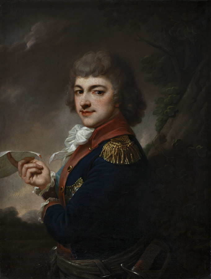 Belarusian (Taraškievica orthography): Партрэт Міхала Клеафаса Агінскага (Michał Kleafas Aginski)title QS:P1476,be-tarask:"Партрэт Міхала Клеафаса Агінскага (Michał Kleafas Aginski)" label QS:Lbe-tarask,"Партрэт Міхала Клеафаса Агінскага (Michał Kleafas Aginski)"